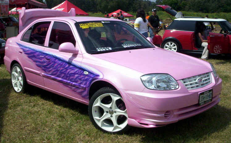 Pink Tuning Car